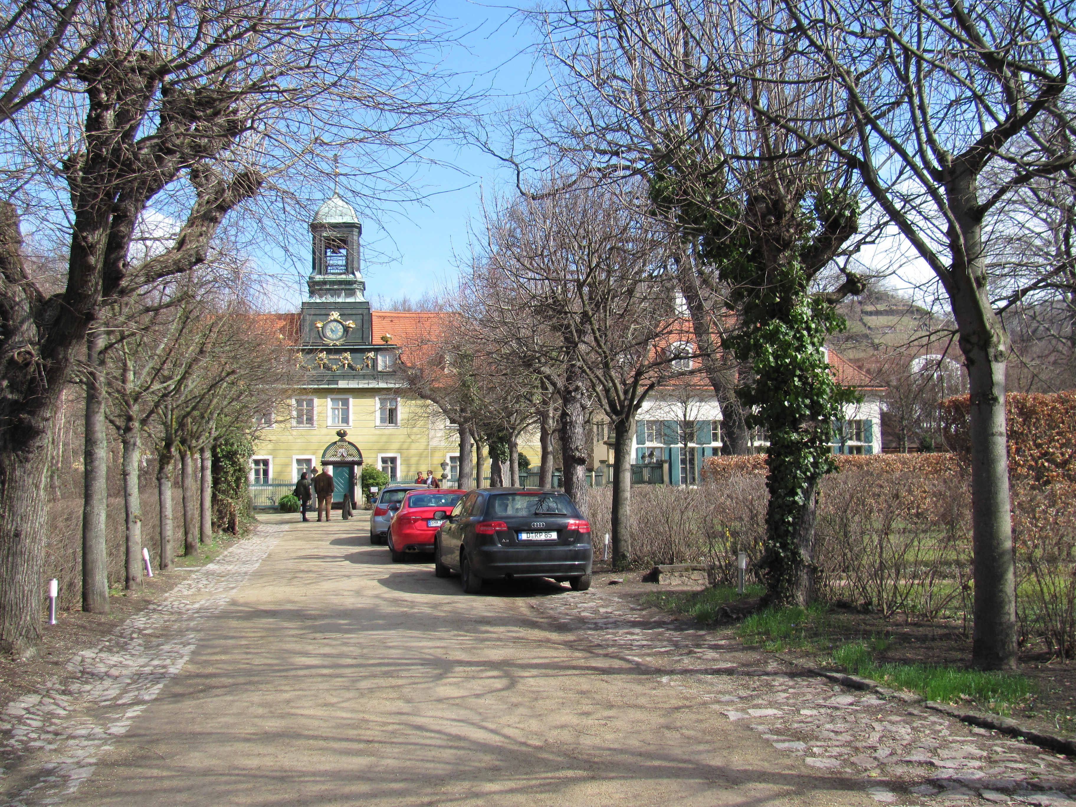 Radebeul Haus Sorgenfrei und Gartensaal Hauptzufahrt